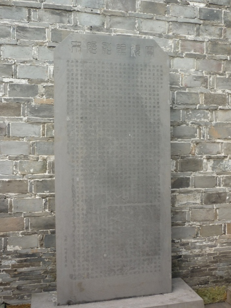 宝顺轮船始末石碑，藏于庆安会馆